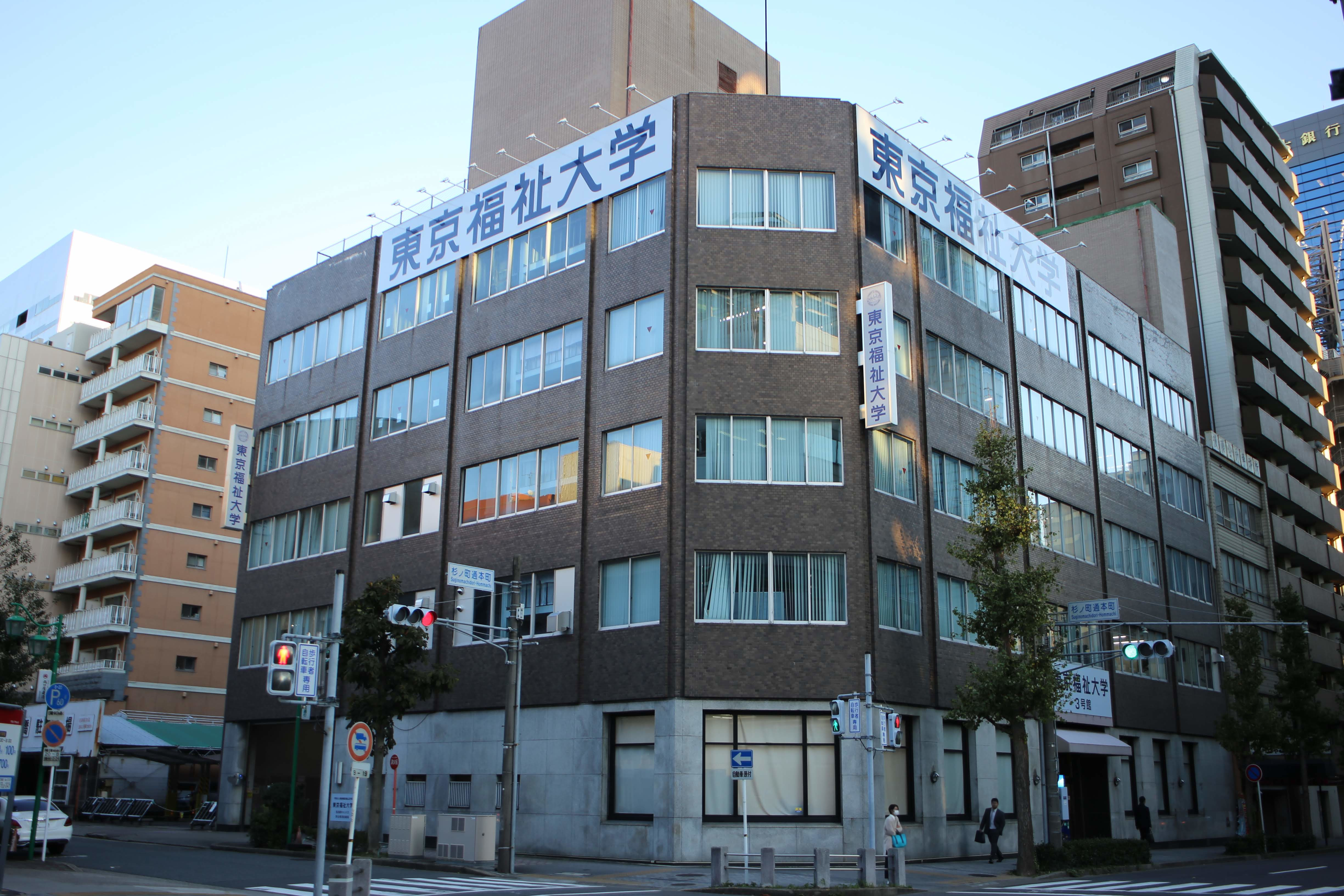 名古屋市中区丸の内 東京福祉大学名古屋キャンパス